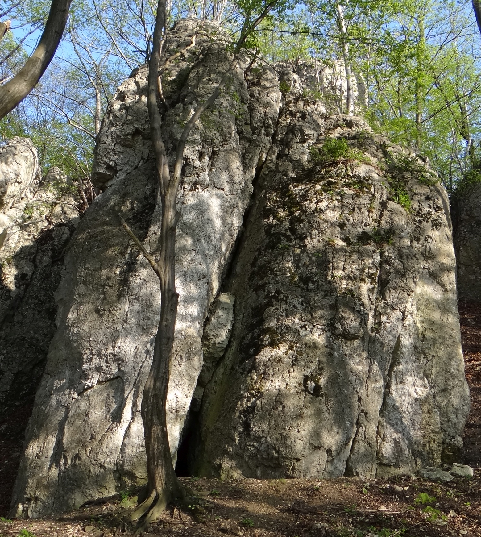 Skała Jenorożec w grupie skały Rogożowej w Przeginii